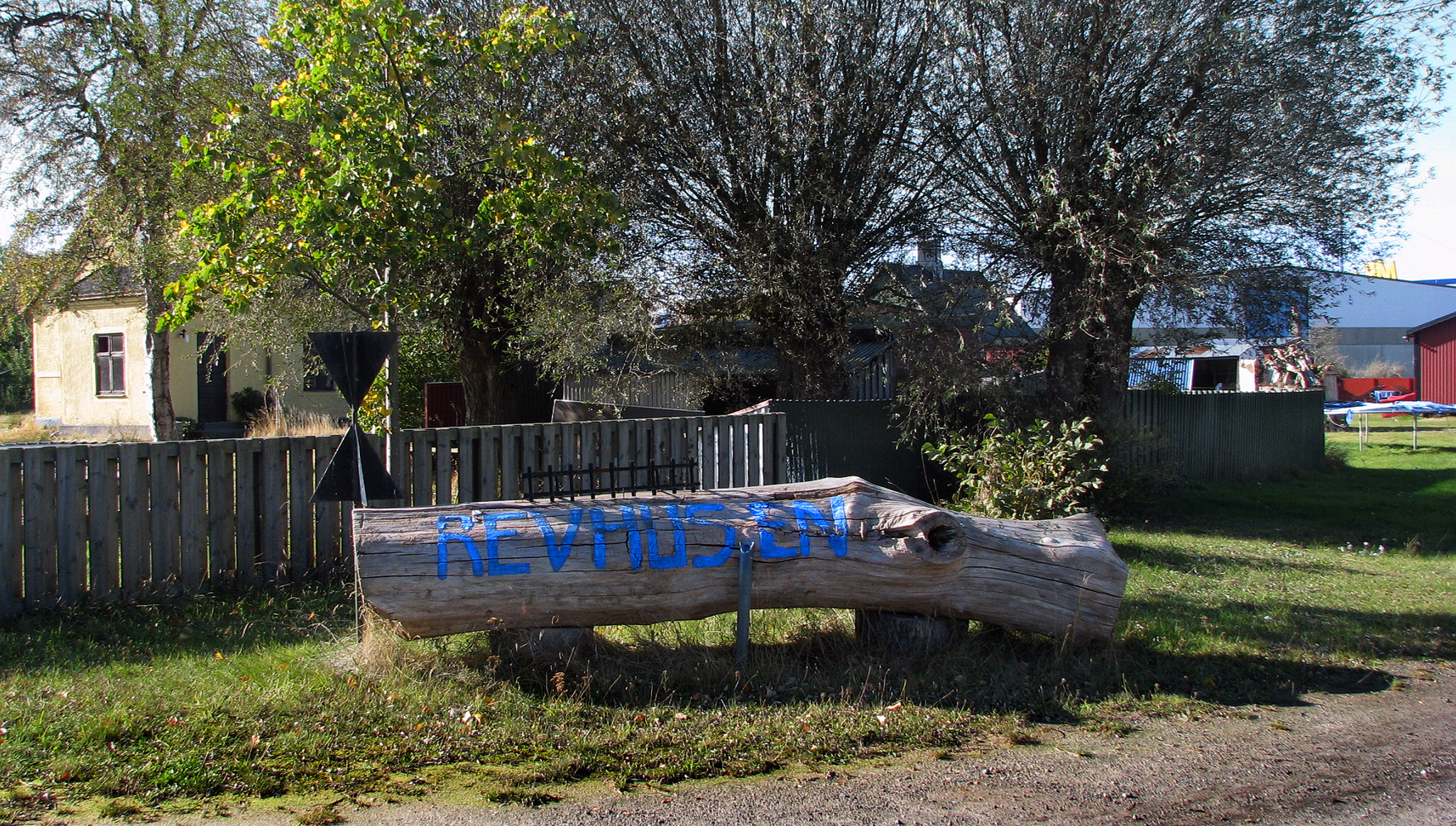 Välkommen till Revhusen. Bilden från östra infarten, Norra Revhusvägen - Världens ände.